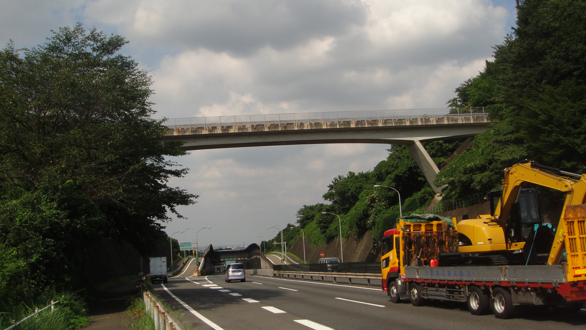 八王子バイパス 片倉IC